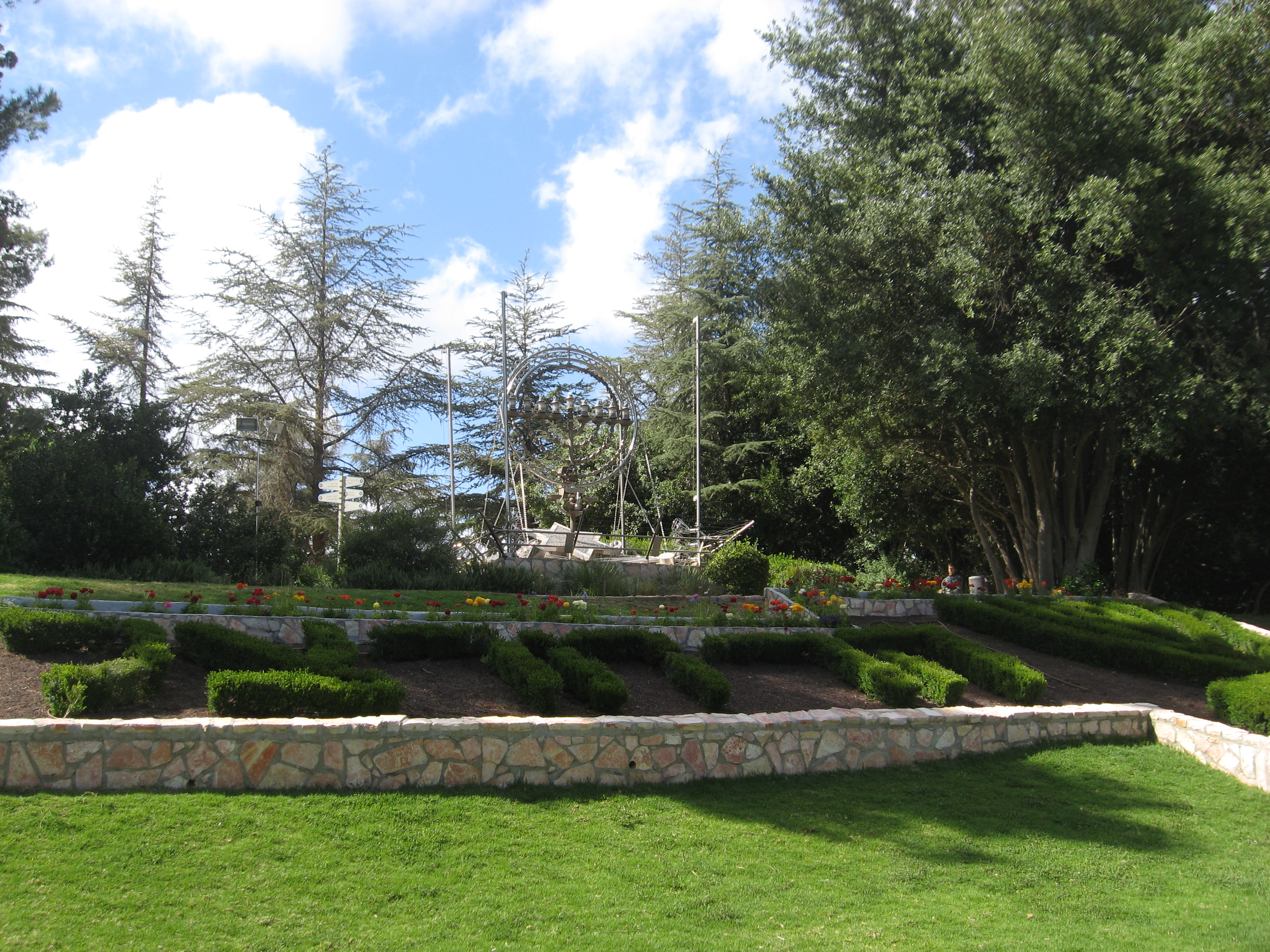 Скульптурная композиция с ханукиёй на Горе Герцля в Иерусалиме.